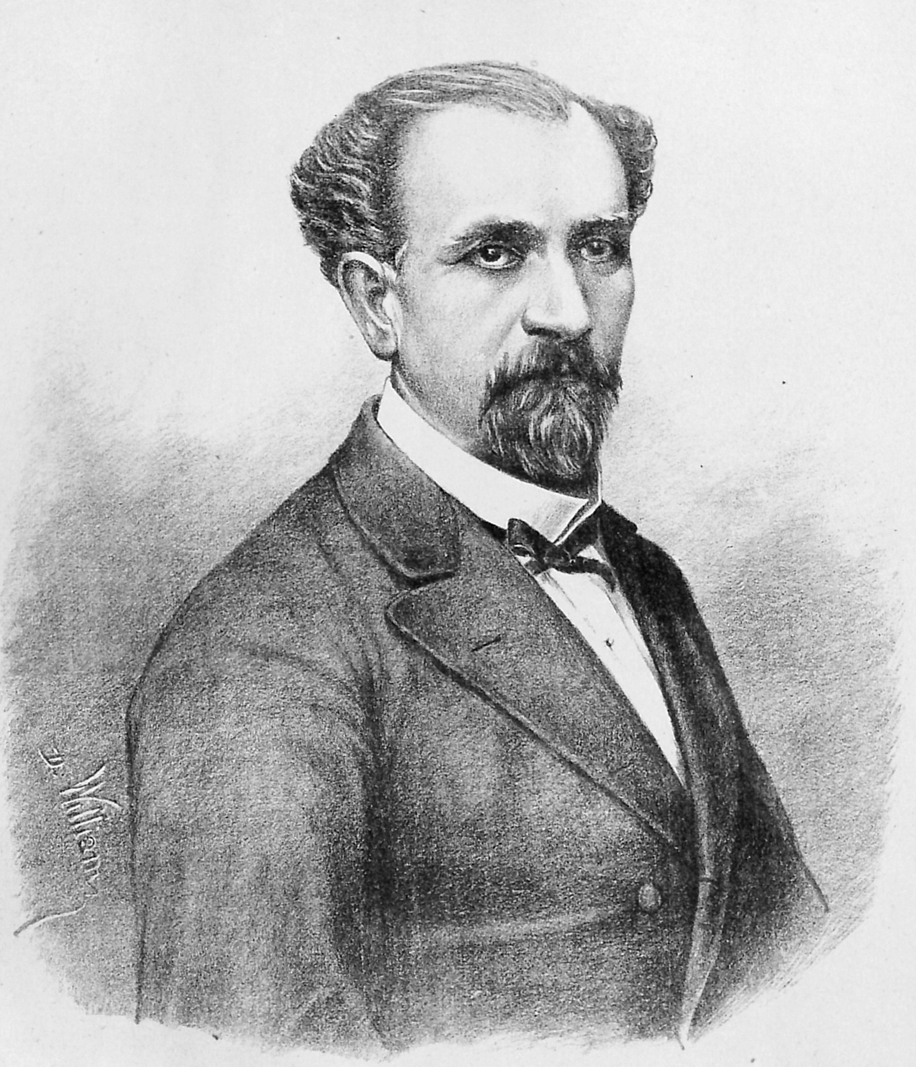 Portraits contemporains avec autographes : Politique, armée, clergé, letters, théatres & arts dessines & lithographies par D. William Bukarest, 1881 V. Boerescu - Ministre des affaires étrangères